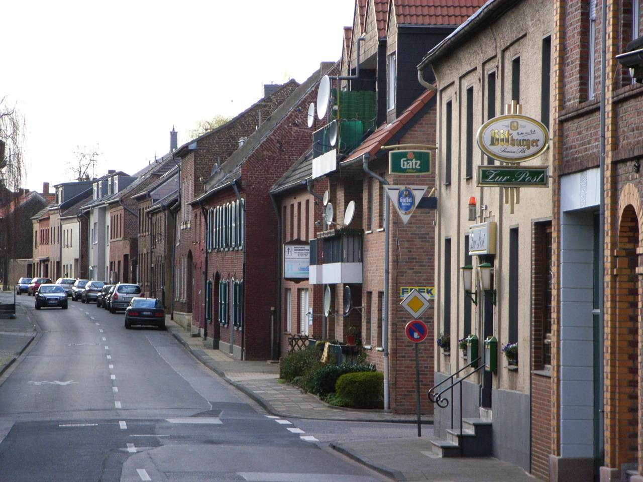 Hauptstraße mit Kneipe, Satellitenschüsseln und historischen Gebäuden Erkelenz-Lövenich